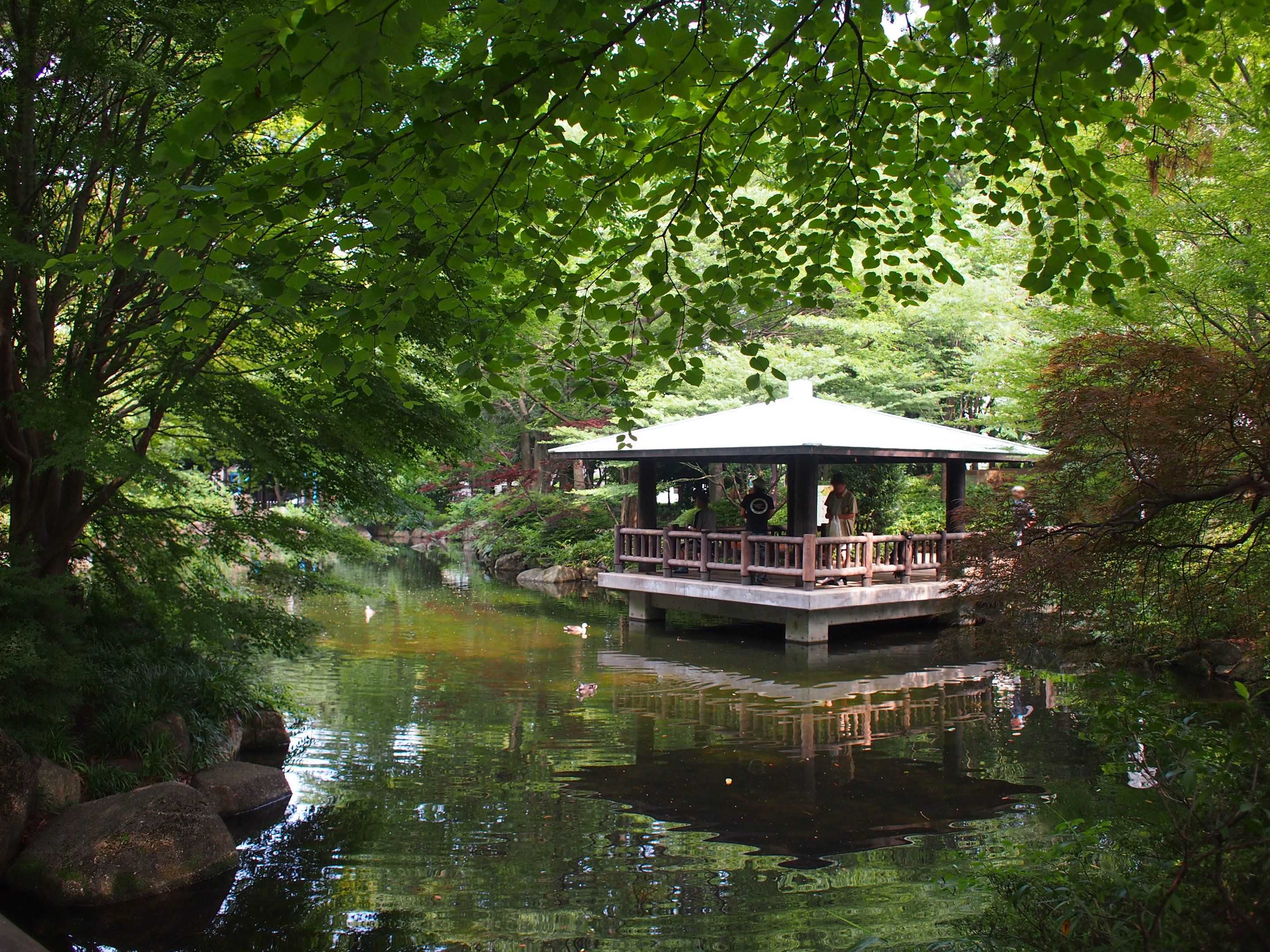 杉並区井草森公園